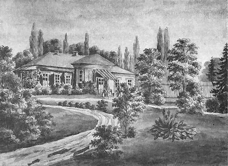 Рівне. Двір Любомирських на Гірці.